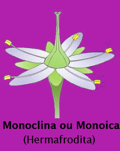 Flor diclina ou dioica.